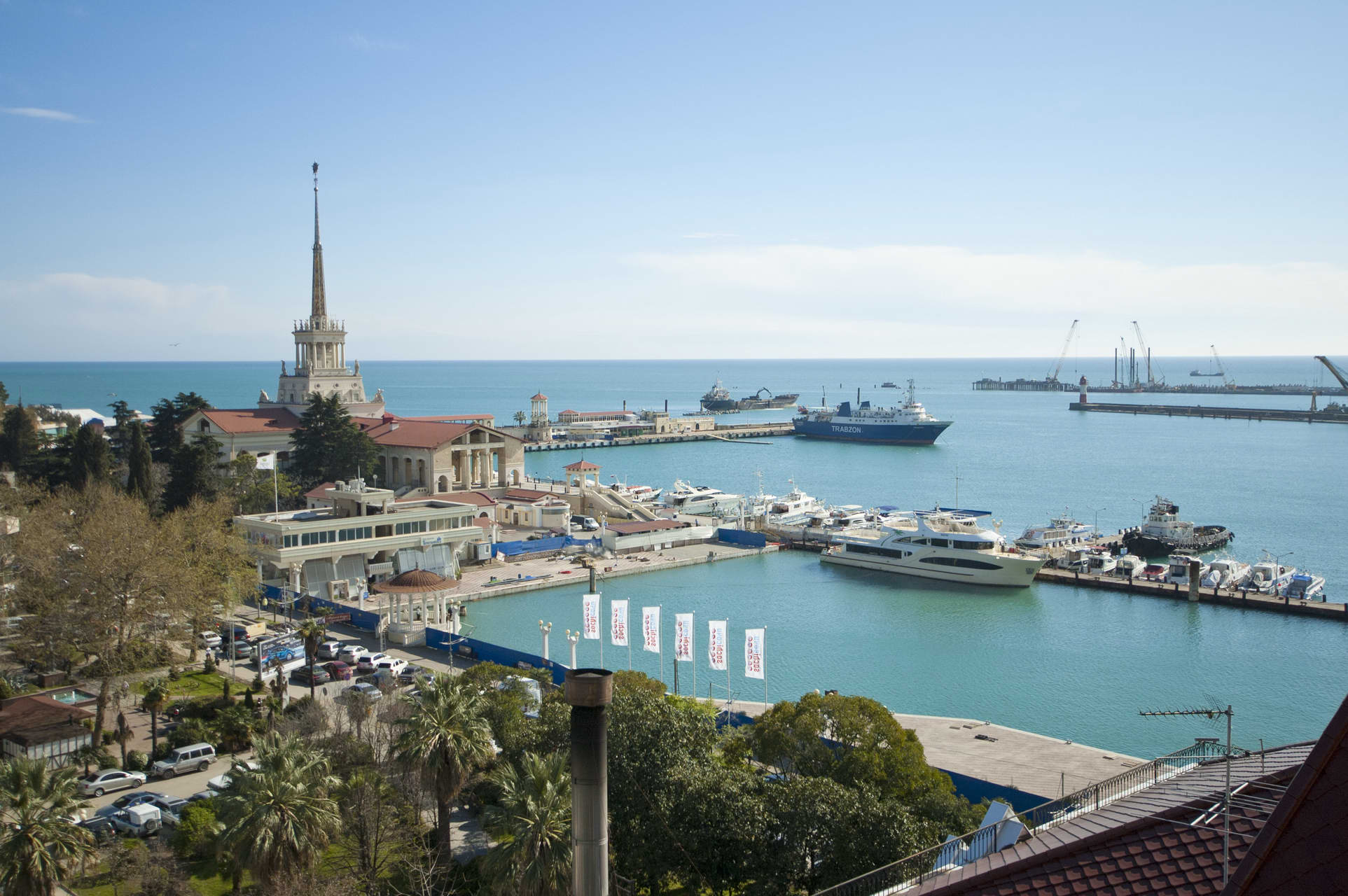 Здание морвокзала (Краснодарский край, Сочи, войкова улица, 1)